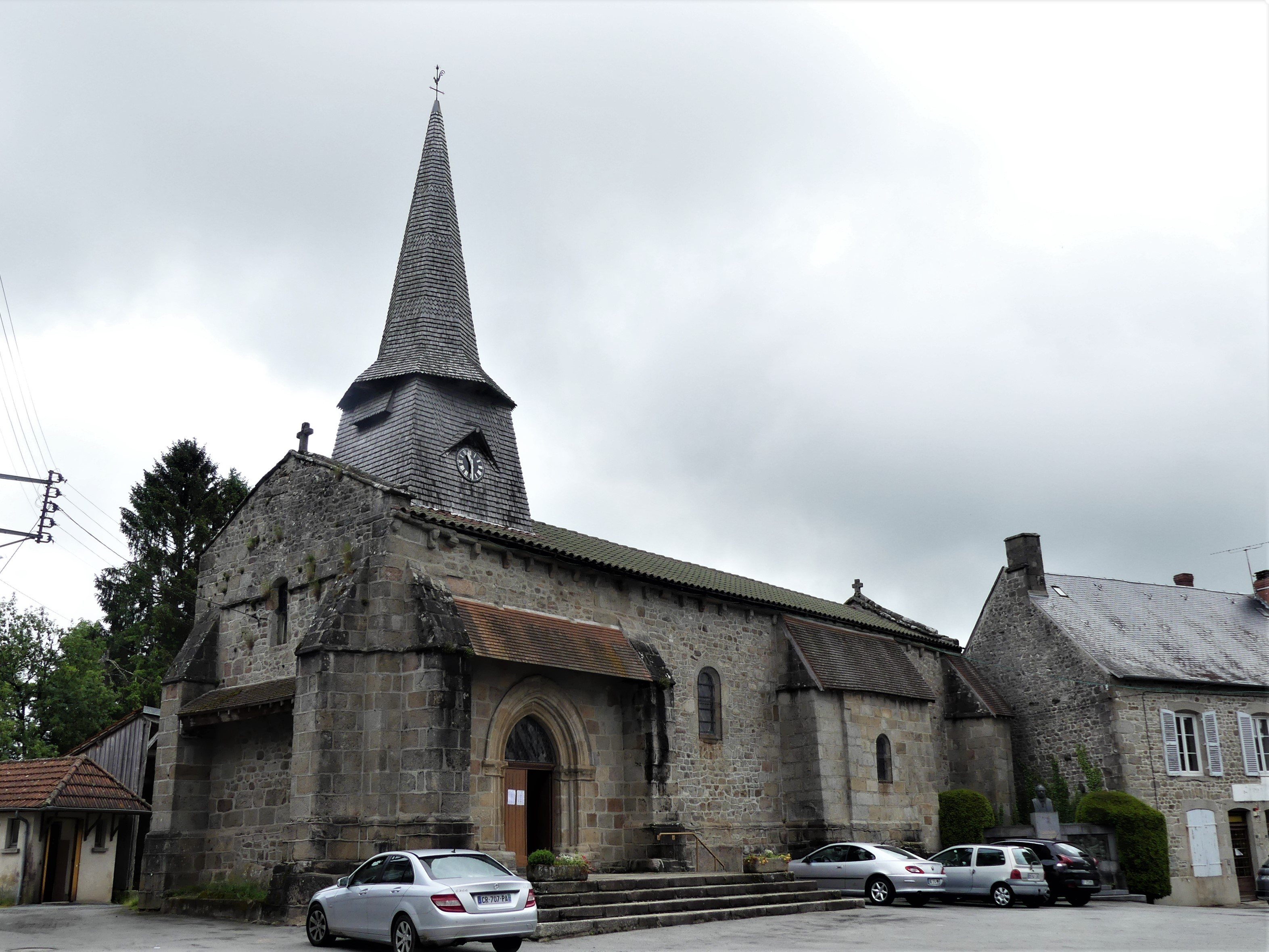 L'église de Sardent, Creuse, France.